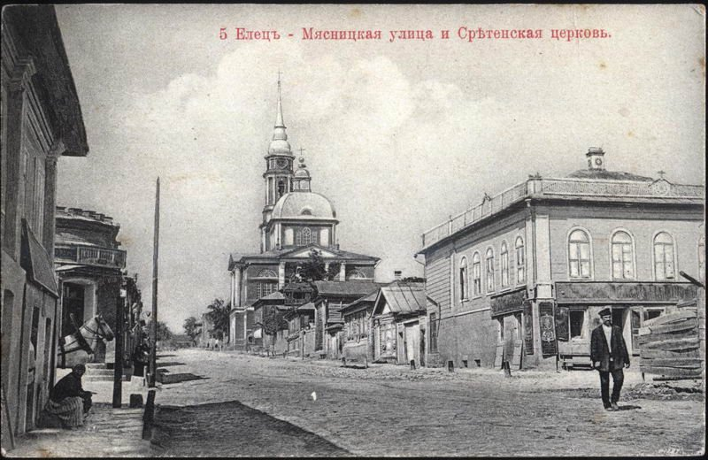 Церковь Сретения Господня в Ельце. Вид с Мясницкой (ныне Лермонтова) улицы. Открытка начала XX века